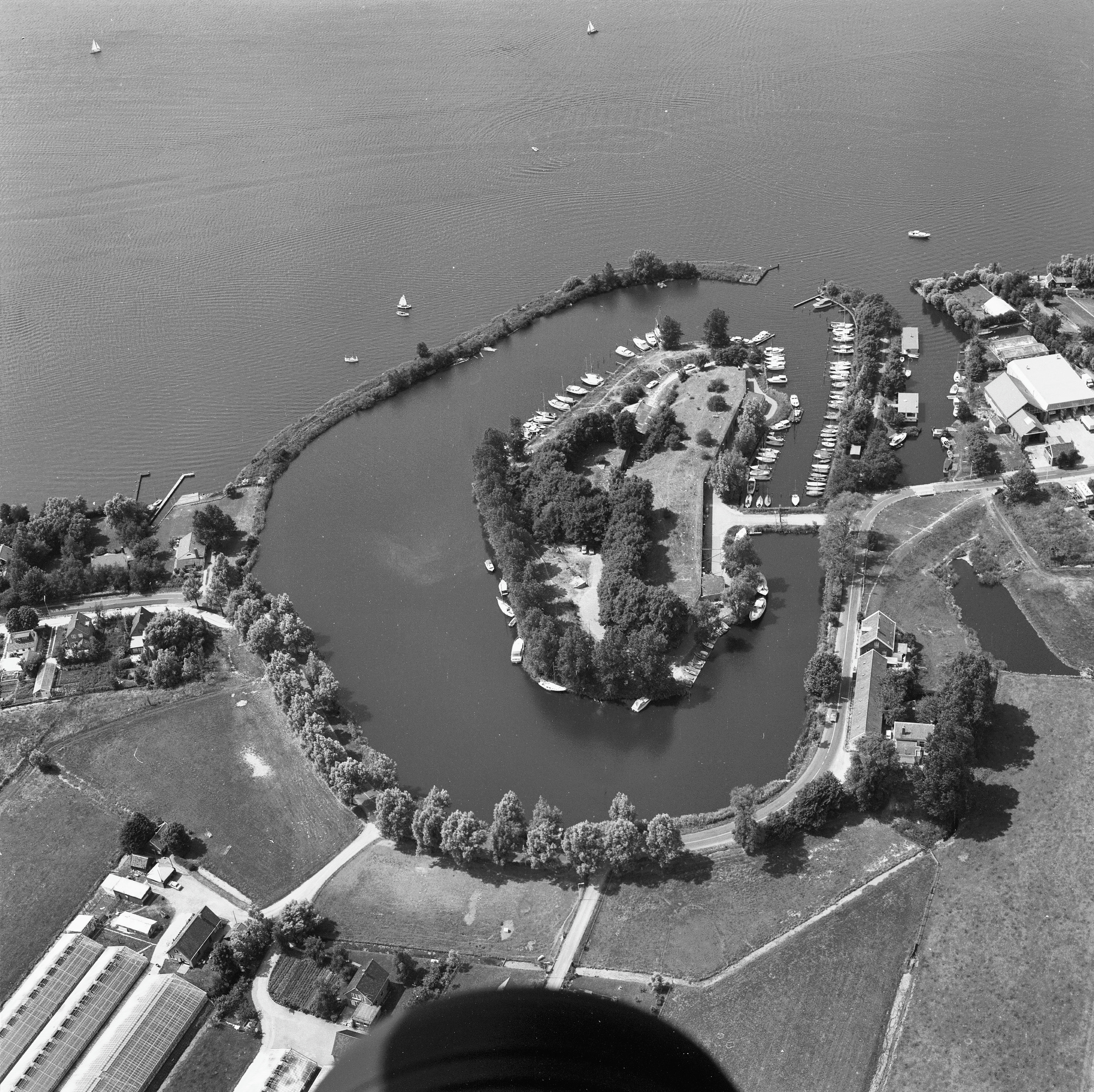 Overzichten: luchtfoto's